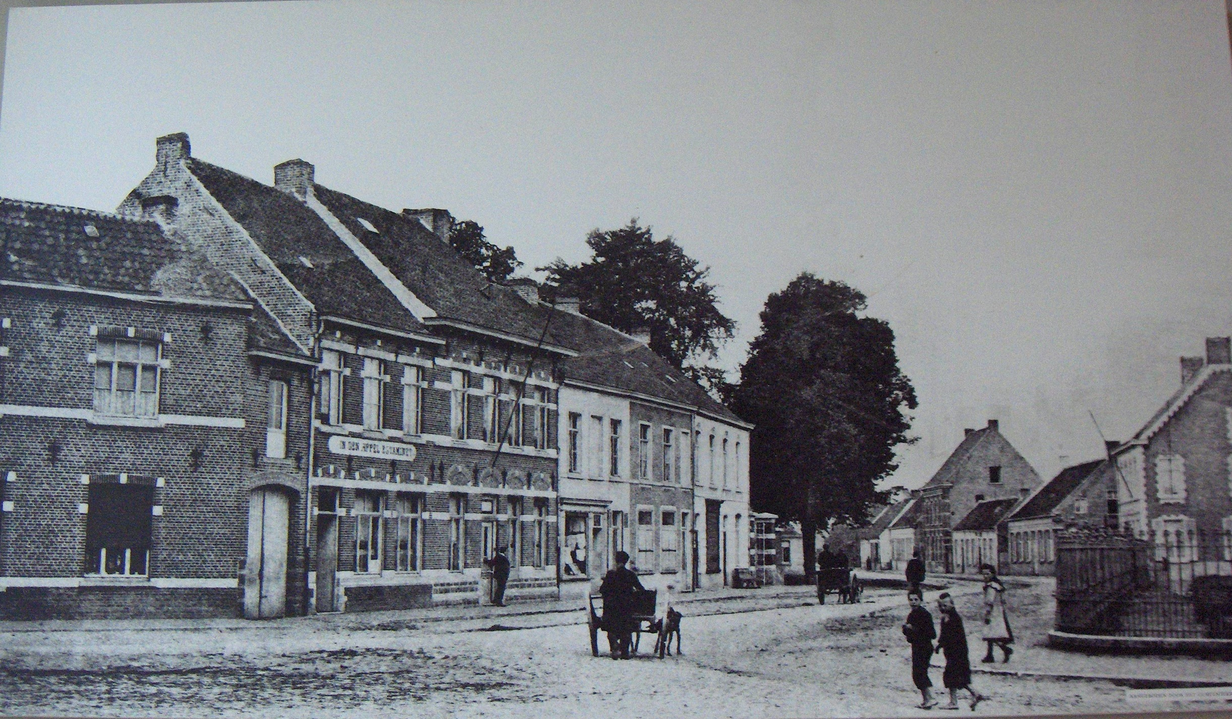 Waarschoot (Belgien, Provinz Ostflandern). Ansicht der Schoolstraat, Dorfmitte (Blick nordwestwärts). Bildaufnahme des späten 19. Jhs.